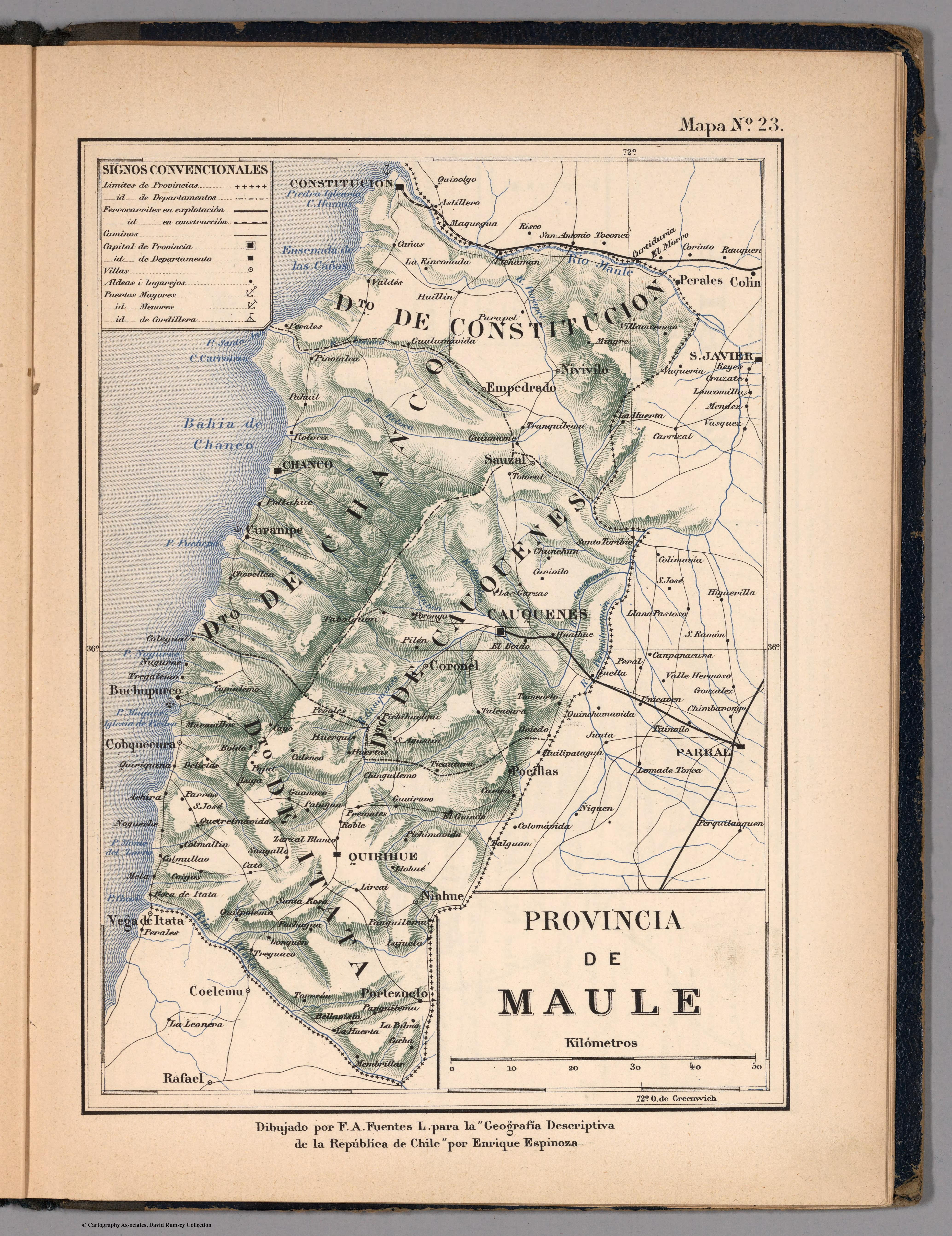 Atlas de Chile Arreglado para la Jeografia Descriptiva de la Republica de Chile por Enrique Espinoza.